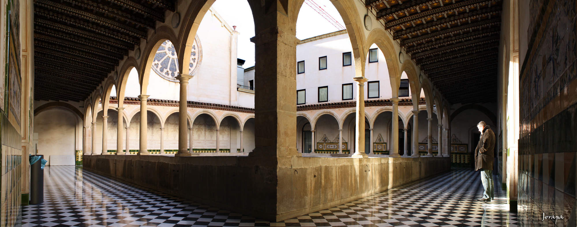 Conjunt de la Casa de la Caritat (Barcelona)